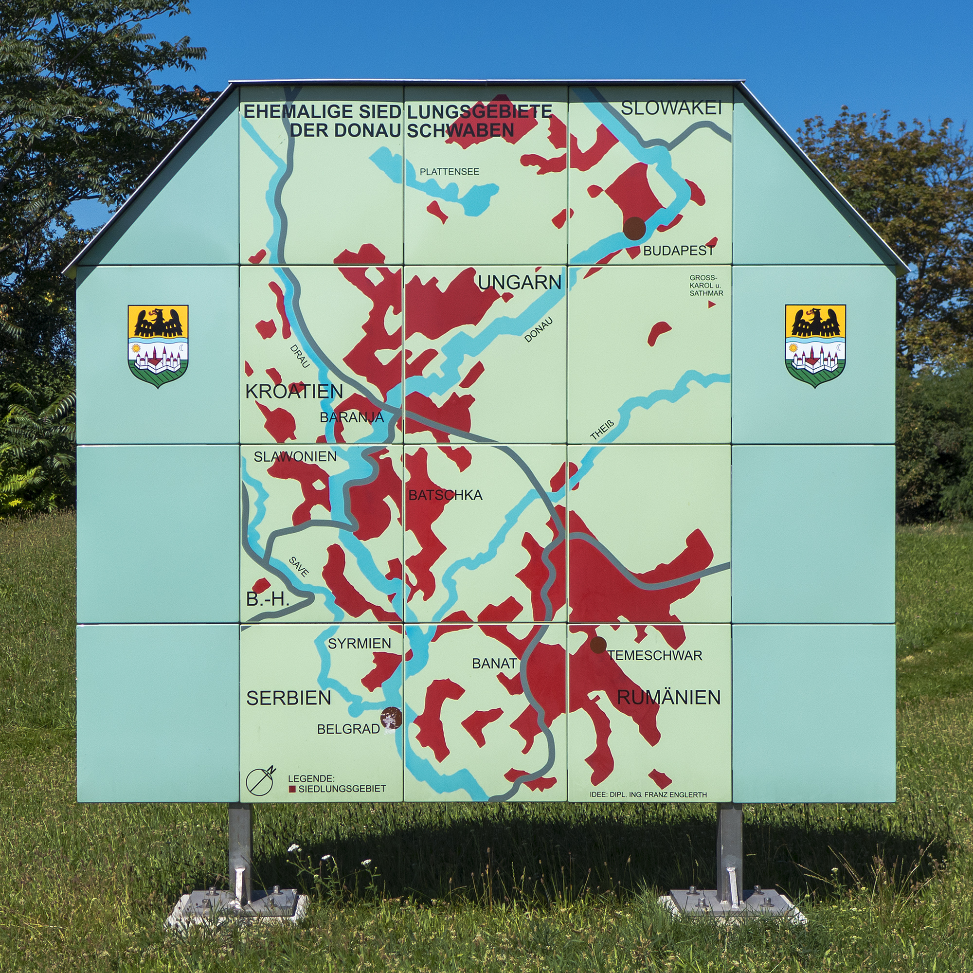 Donauschwabenpark in Wien 21